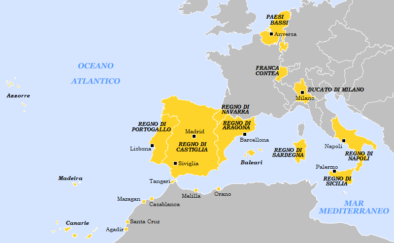 Domini di Filippo II di Spagna